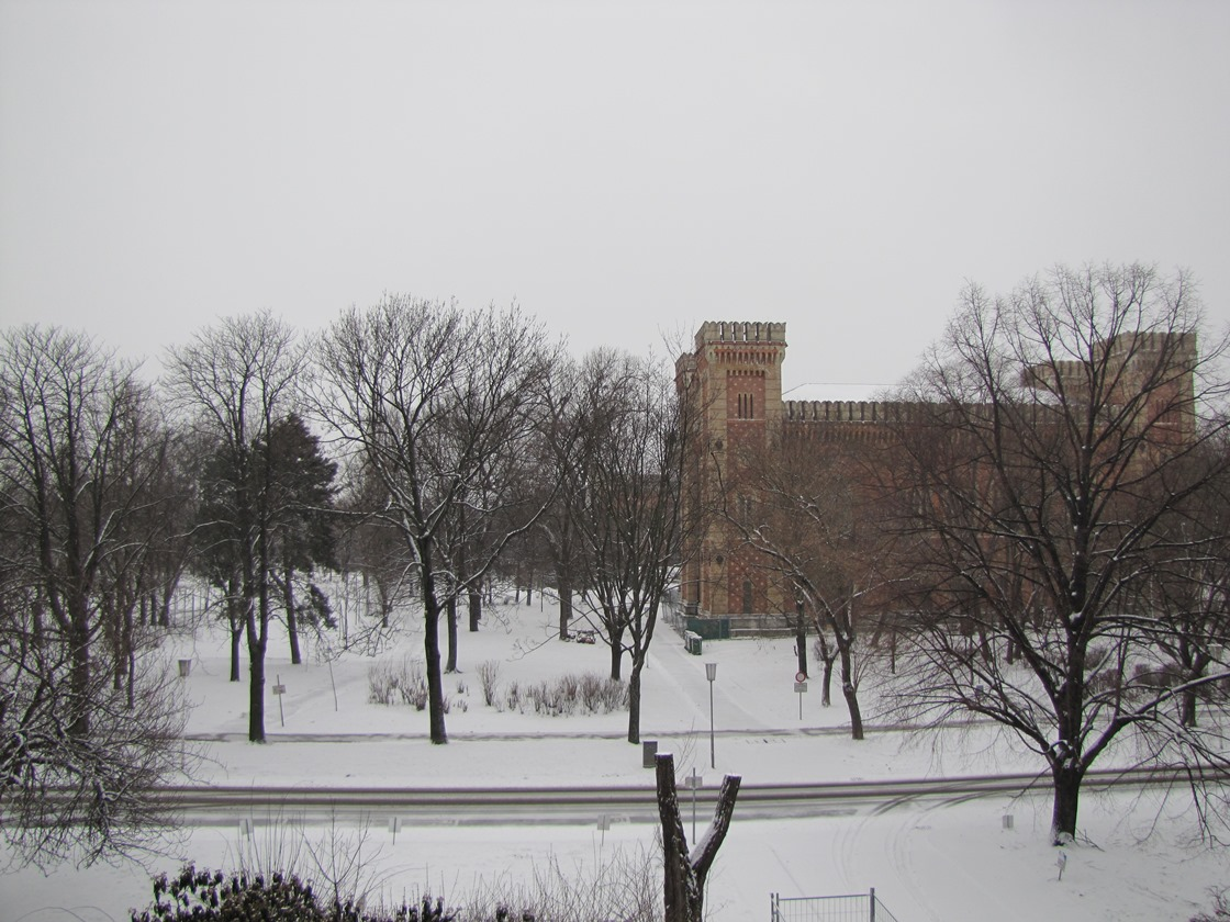 Arsenal mit HGM von Osten aus gesehen